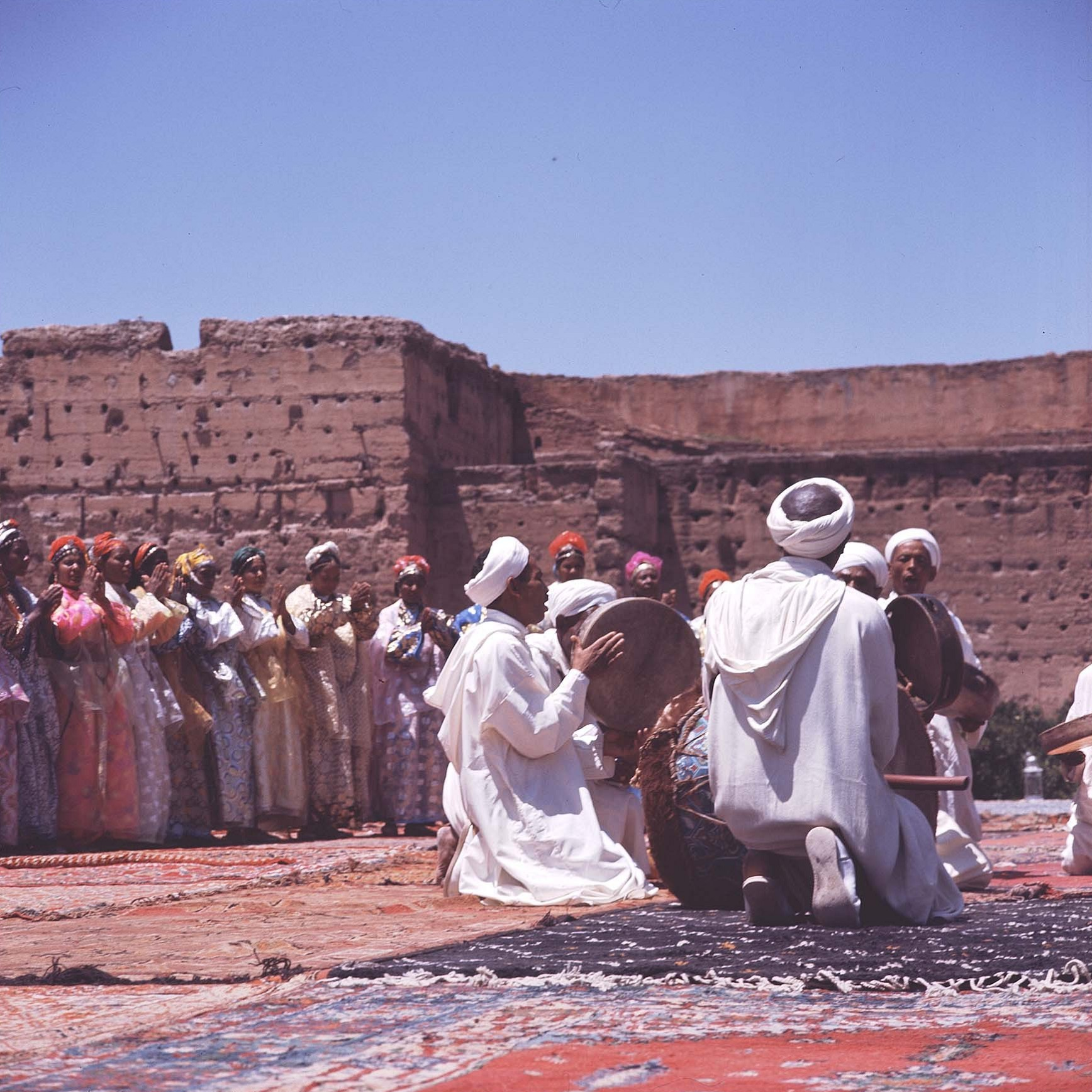 De dansgroep op de foto voert een Ahwash-dans uit Ouarzazate uit.